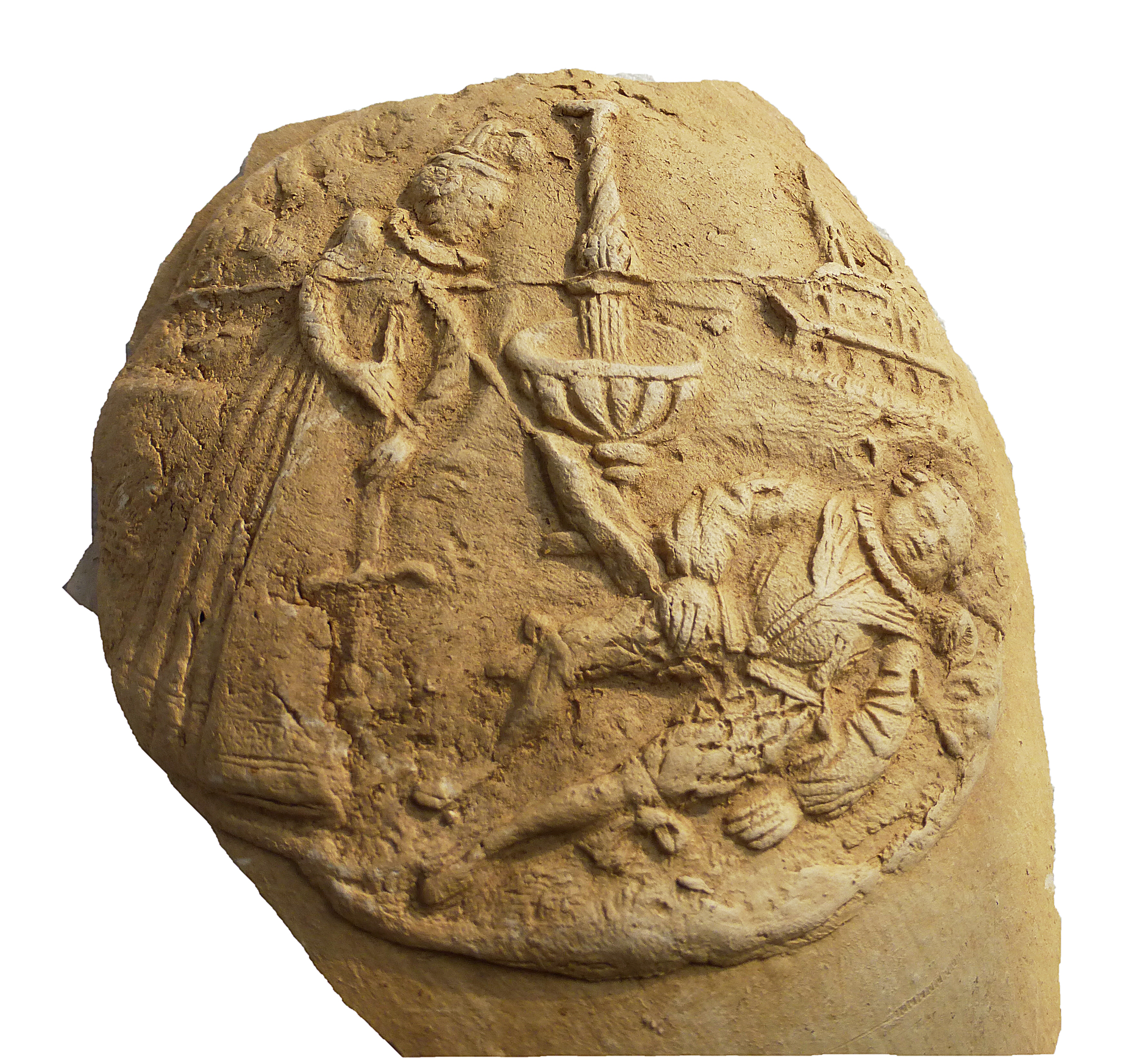 Tonscherbe mit Pyramus und Thispe aus Gschaid